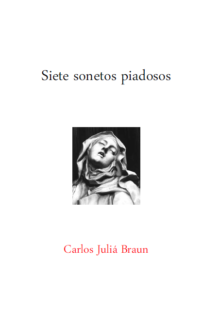 Carlos Julià Braun, cubierta de 'Siete sonetos piadosos' (2013)